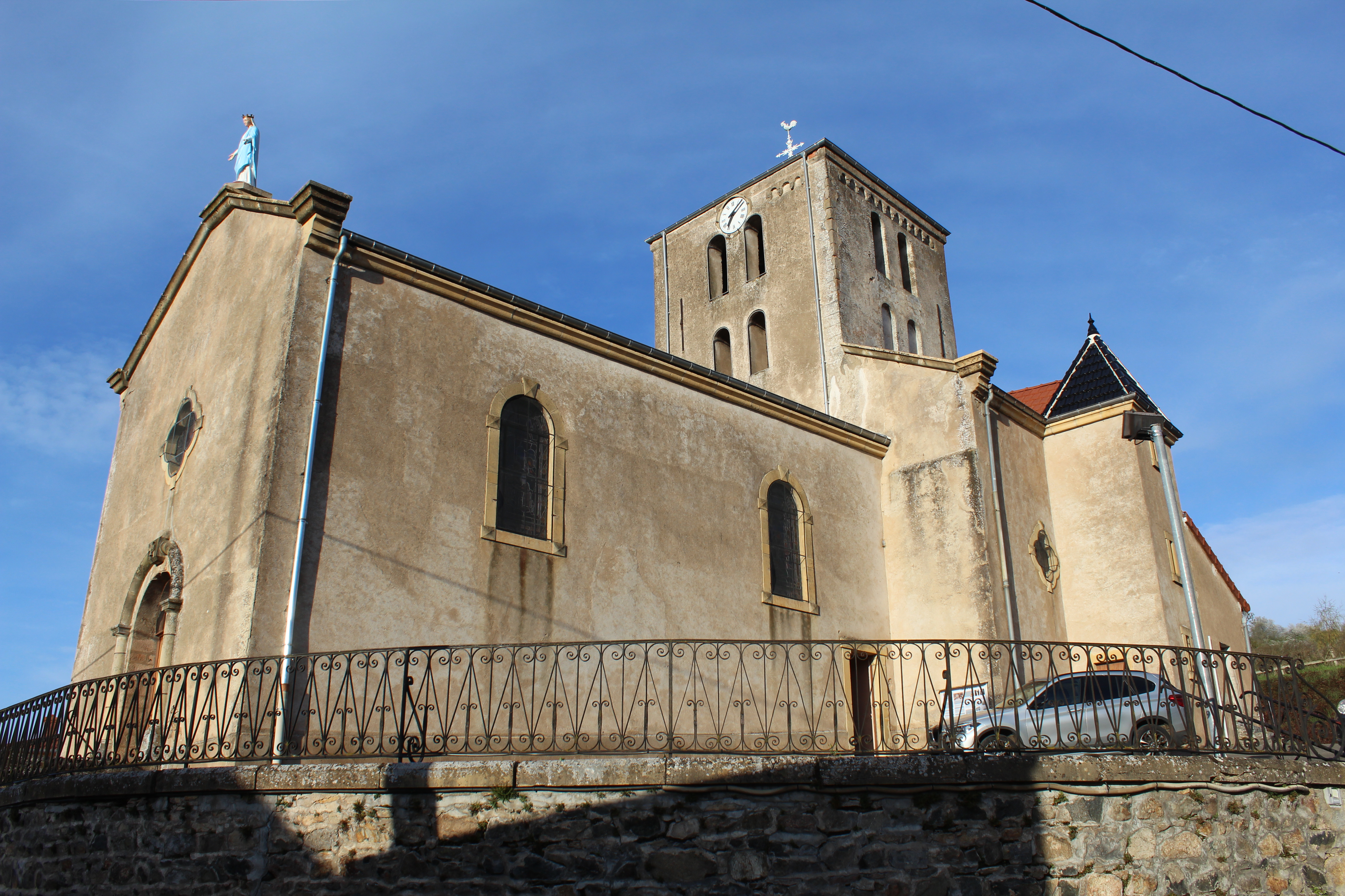 Église Saint-Pierre de Saint-Pierre-le-Vieux, Saône-et-Loire.